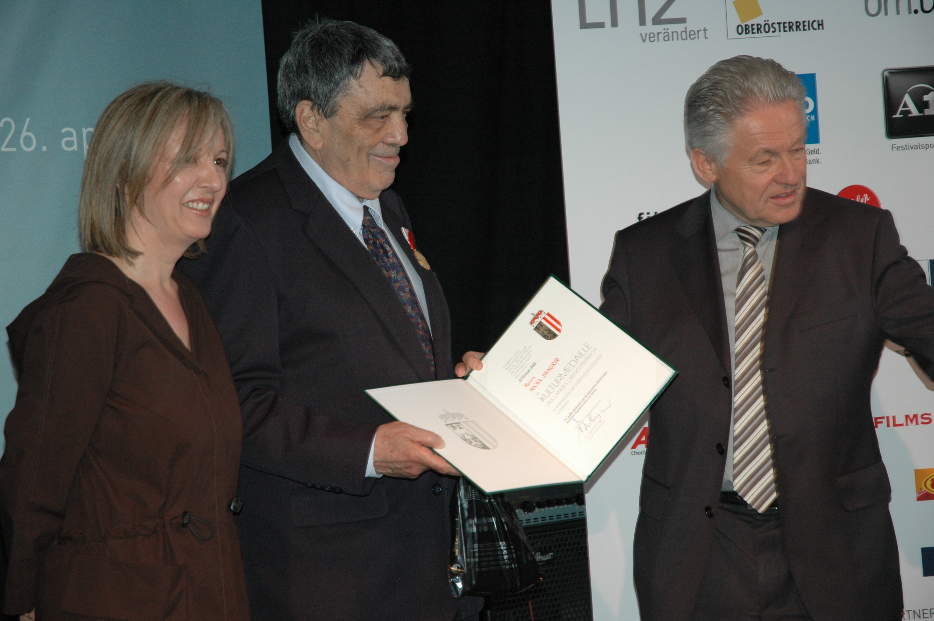 de: Verleihung der oberösterreichischen Landeskulturmedaille von Landeshauptmann Josef Pühringer an den israelischen Filmproduzenten und -regisseur Micha Shagrir an der Eröffnungsfeier des Crossing Europe Filmfestivals 2009 in Linz en: Micha Shagrir gets the medal of culture of the Austrian state (Bundesland) Upper Austria from the governor (Landeshauptmann) Josef Pühringer